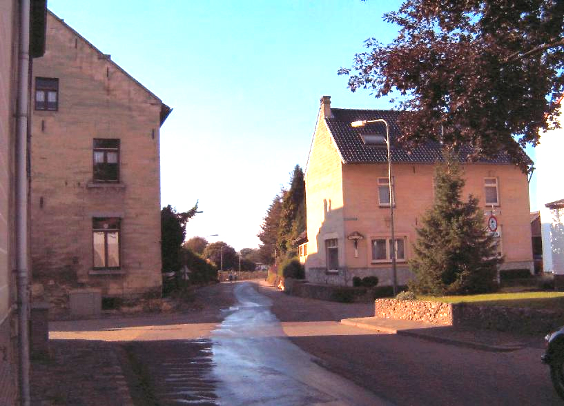 Limburgs: Iezere, kruuspunt 2005